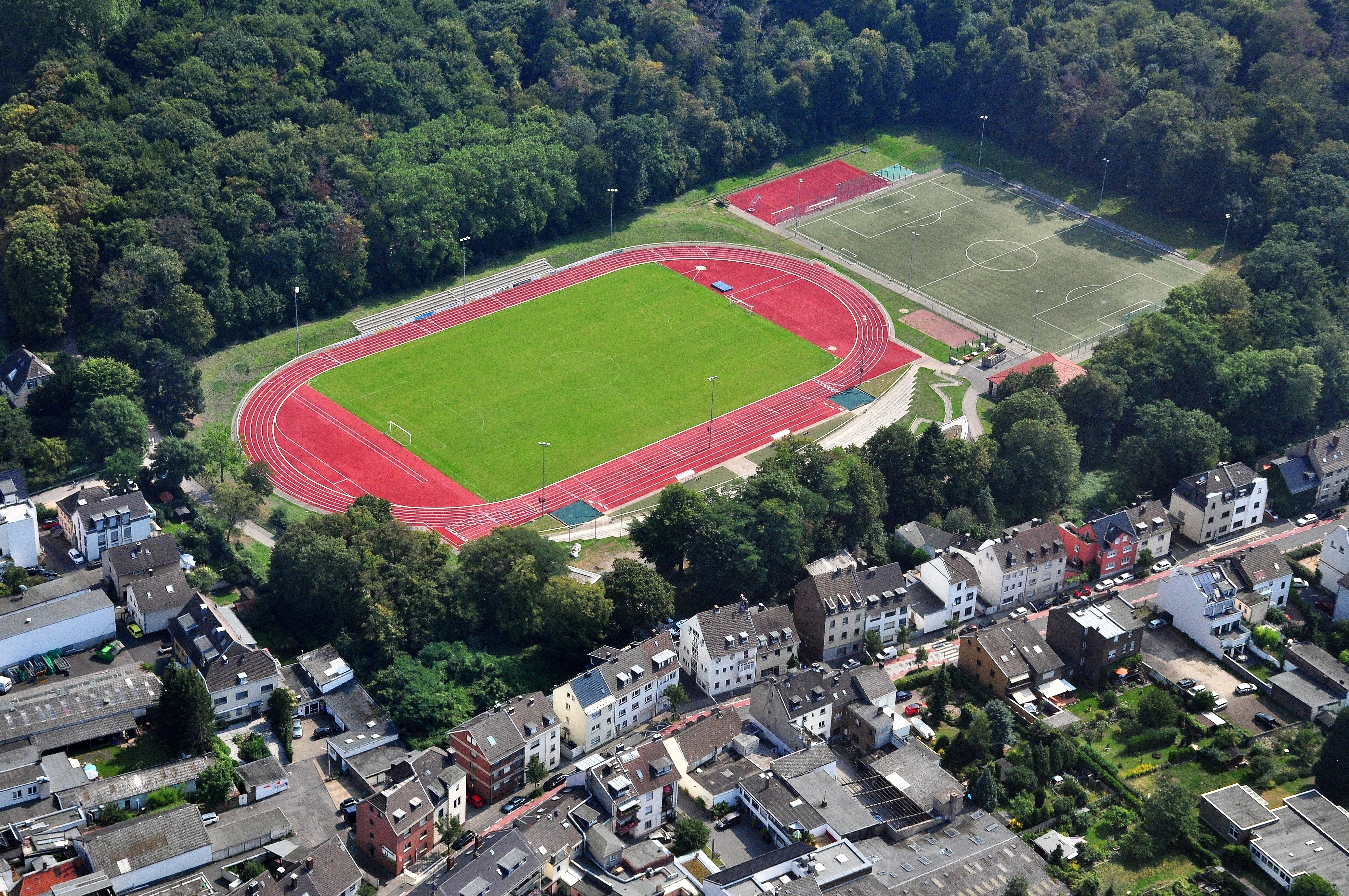 Brühl – Schlossparkstadion, Luftbild aus nordwestlicher Richtung